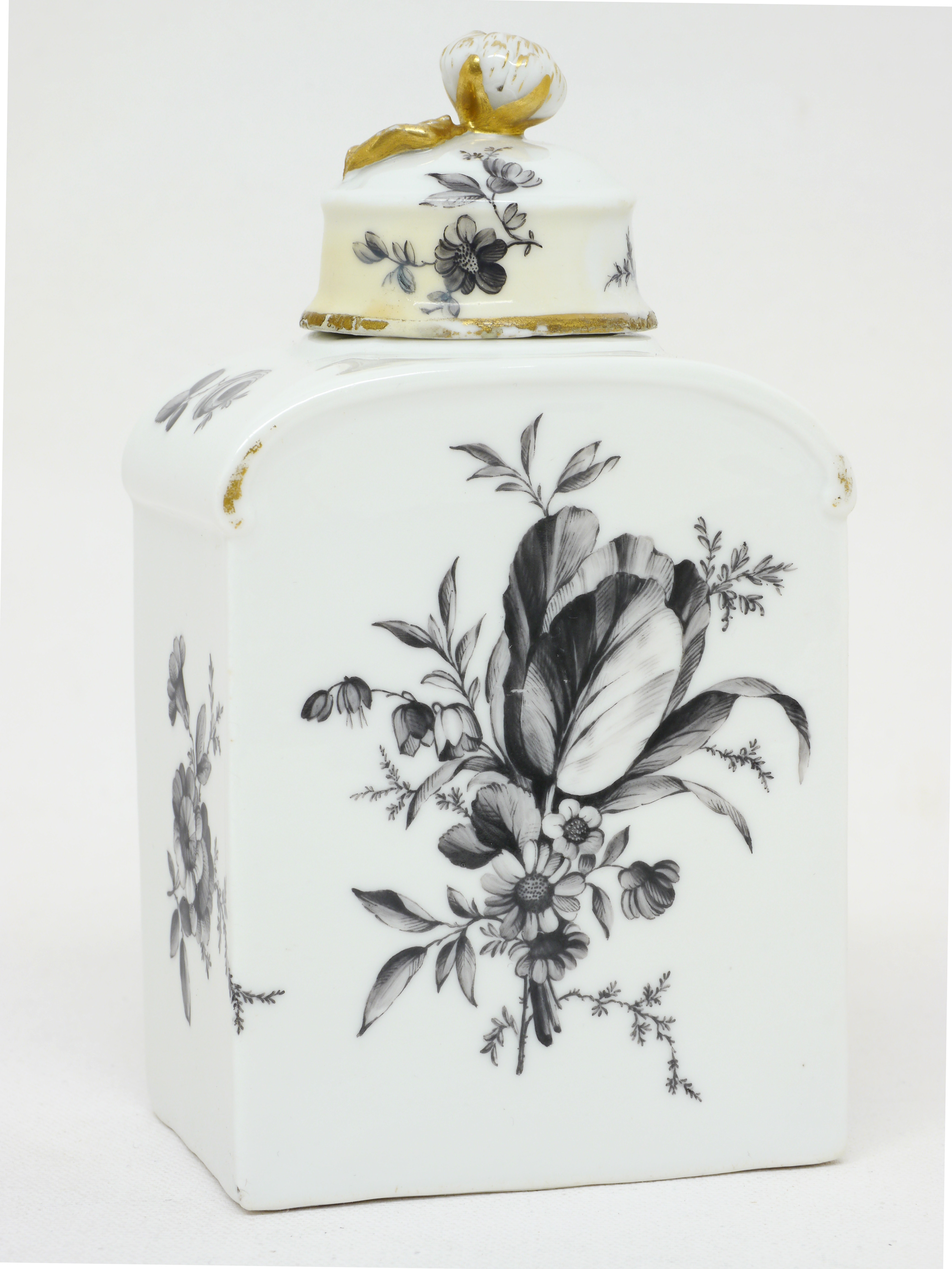 Beispiel für Grisaille-Malerei, auch Schwarzlot-Malerei genannt